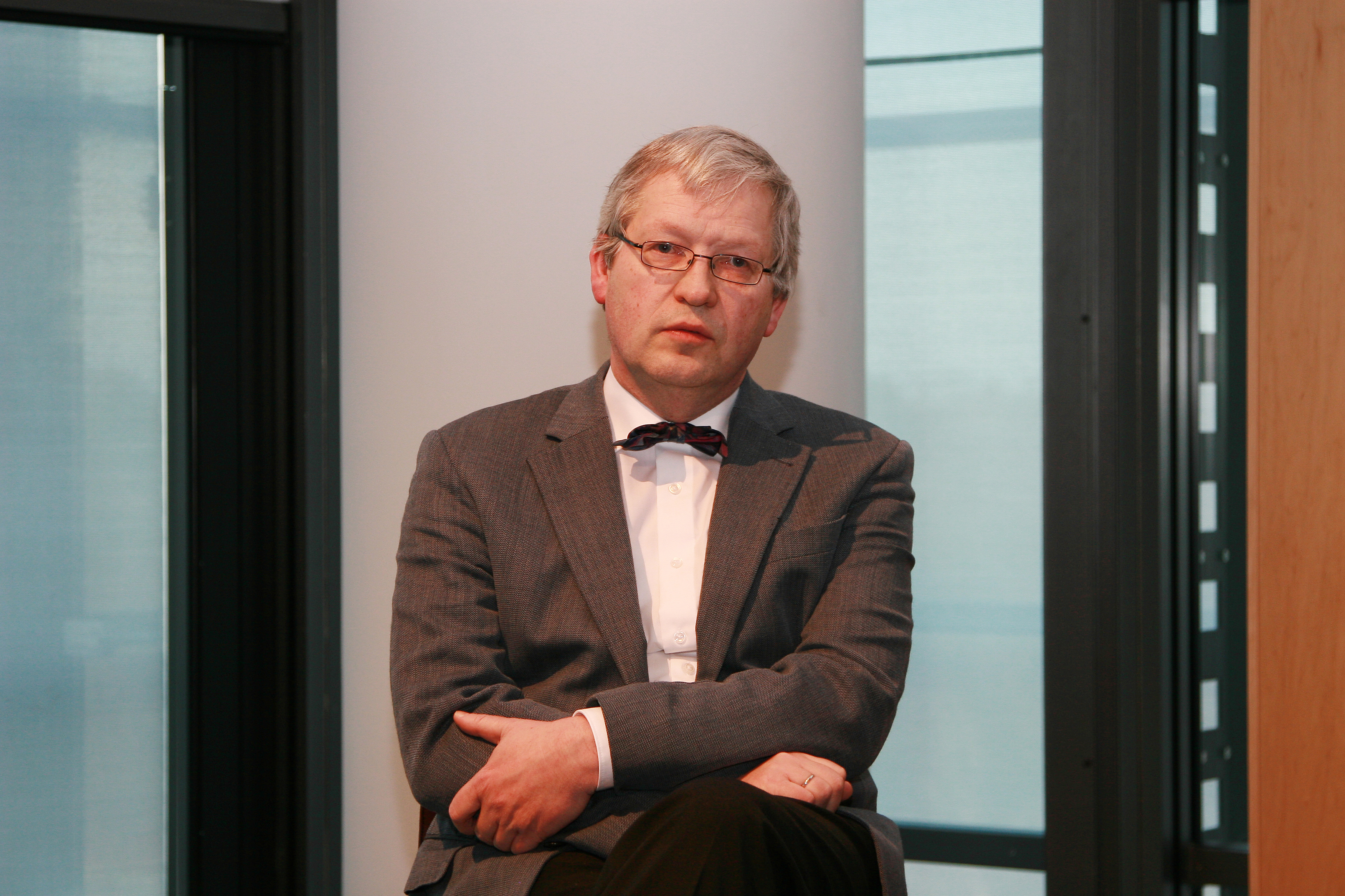 Hartmut Steeb, Generalsekretär der Evangelischen Allianz Deutschland, am 25. Februar 2011 auf dem Kongress christlicher Führungskräfte in Nürnberg.